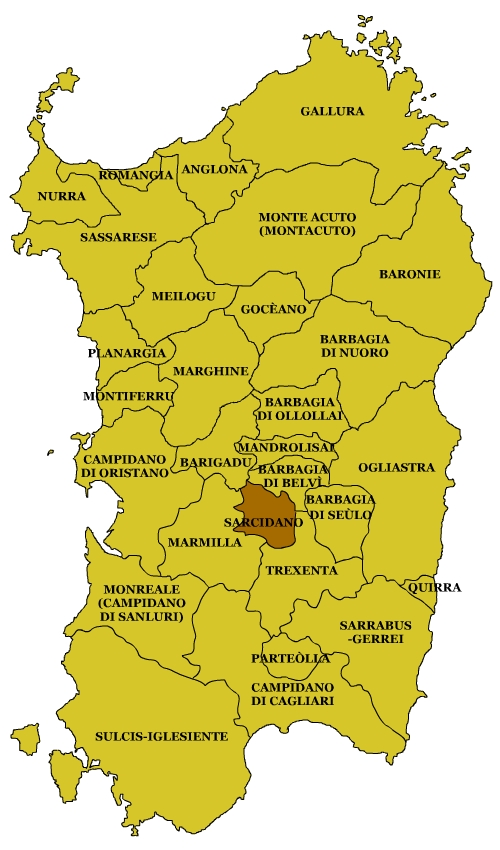 Sardinian Subregions